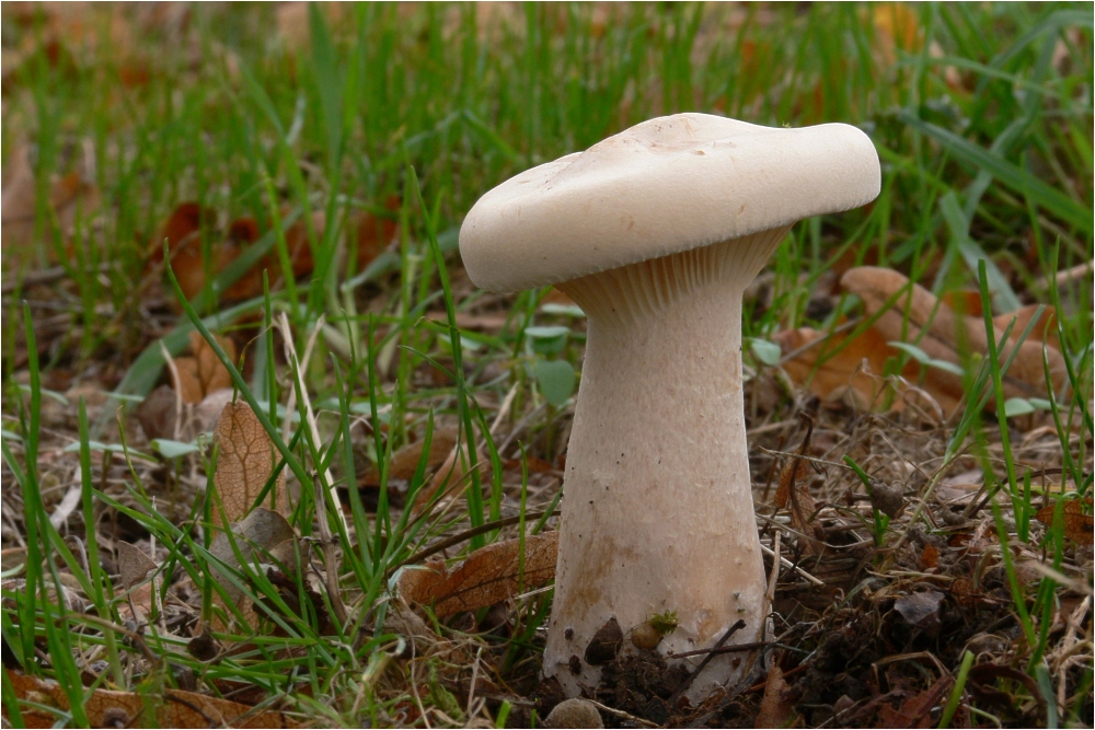 Mönchskopf (Clitocybe geotropa)